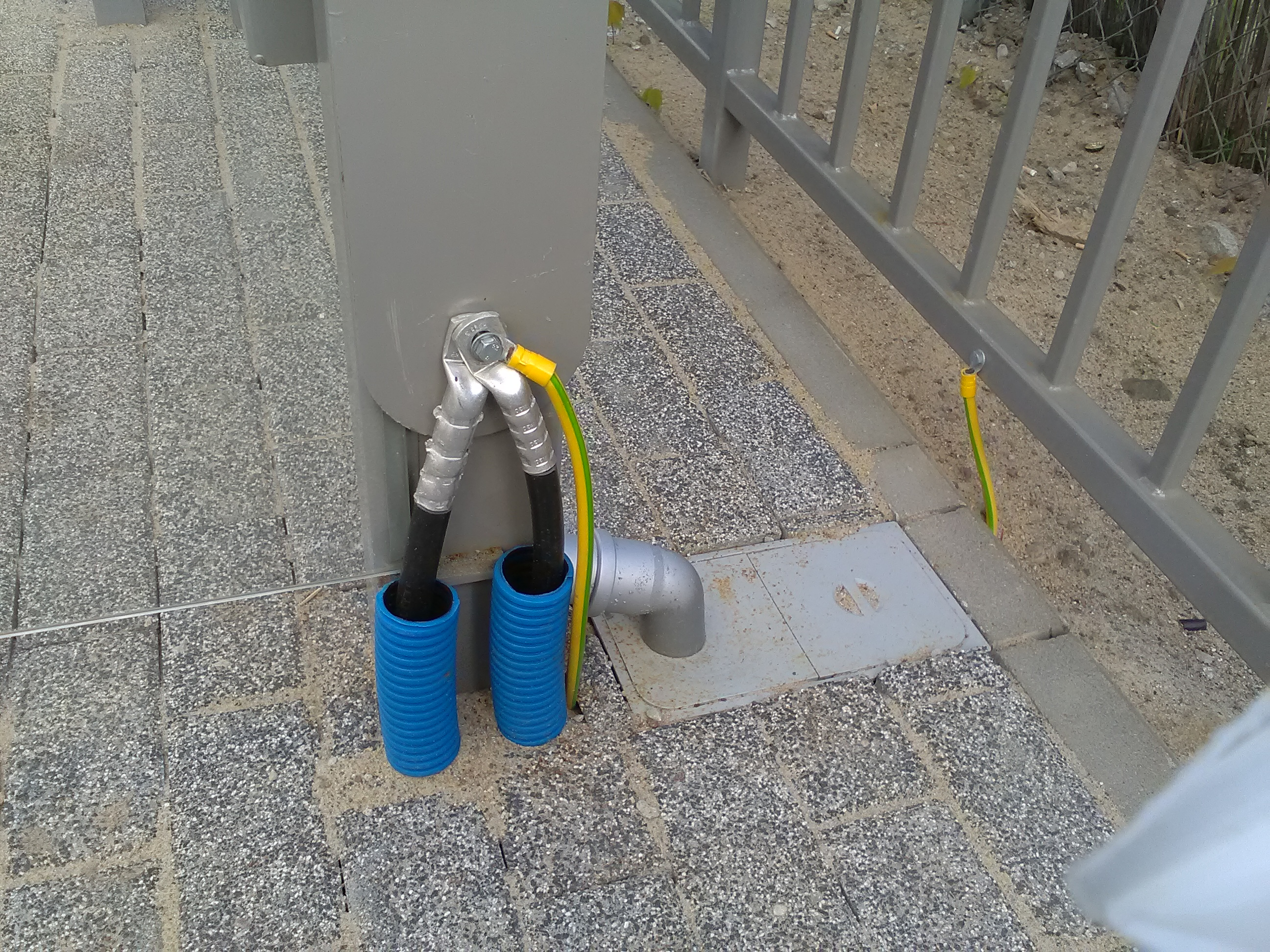 Stacja kolejowa Poznań Dębina. Przykład połączenia wyrównawczego.